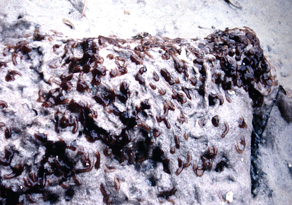 Dans les rivières très polluées, mais en présence d'un courant suffisant, du printemps à l'automne, des quantités impressionnantes d'oeufs peuvent être pondues par le chironomes. Ici le niveau de la rivièrea baissé la nuit, rendant visible les pontes de chironomes qui formalemnet affleurent l'eau. préservés par les cordons gélatineux et l'humidité du substrat, ils survivront. (Lieu : Blendecques (France), dans le fleuve Aa, dans les années 1985-1990 au moment où il était le plus pollué. Sur cette section, les sédiments y étaient constitués principalement des rejets chroniques d'une papeterie à la station d'épuration de capacité insuffisante et dysfonctionnant, offrant un habitat idéal au chironome plumeux, dont des milliards de larves creusent des galeries où ils se nourrissent. On distingue sur la photo quelques sangsues, d'une espèces capable de survivre dans les sédiments très chargés en matière organique en décomposition). Les larves de chironome contriburont à aérer la vase, participant au processus d'autoépuration et à la transparence de l'eau.